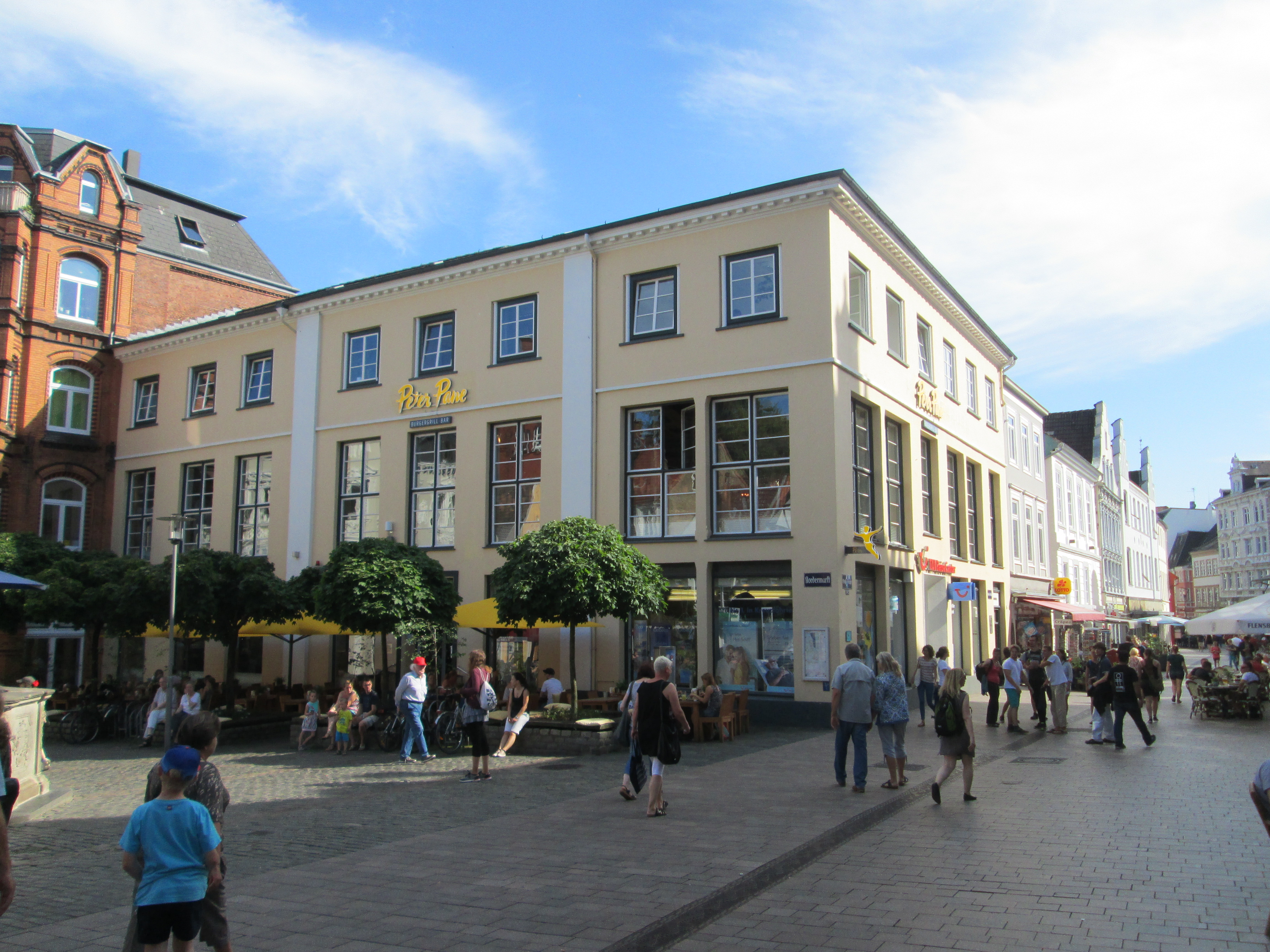 Den kongelige postholderi / Hotel Rasch ved Nørretorvet i Flensborg.